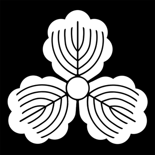 「三ツ柏」紋（染抜）